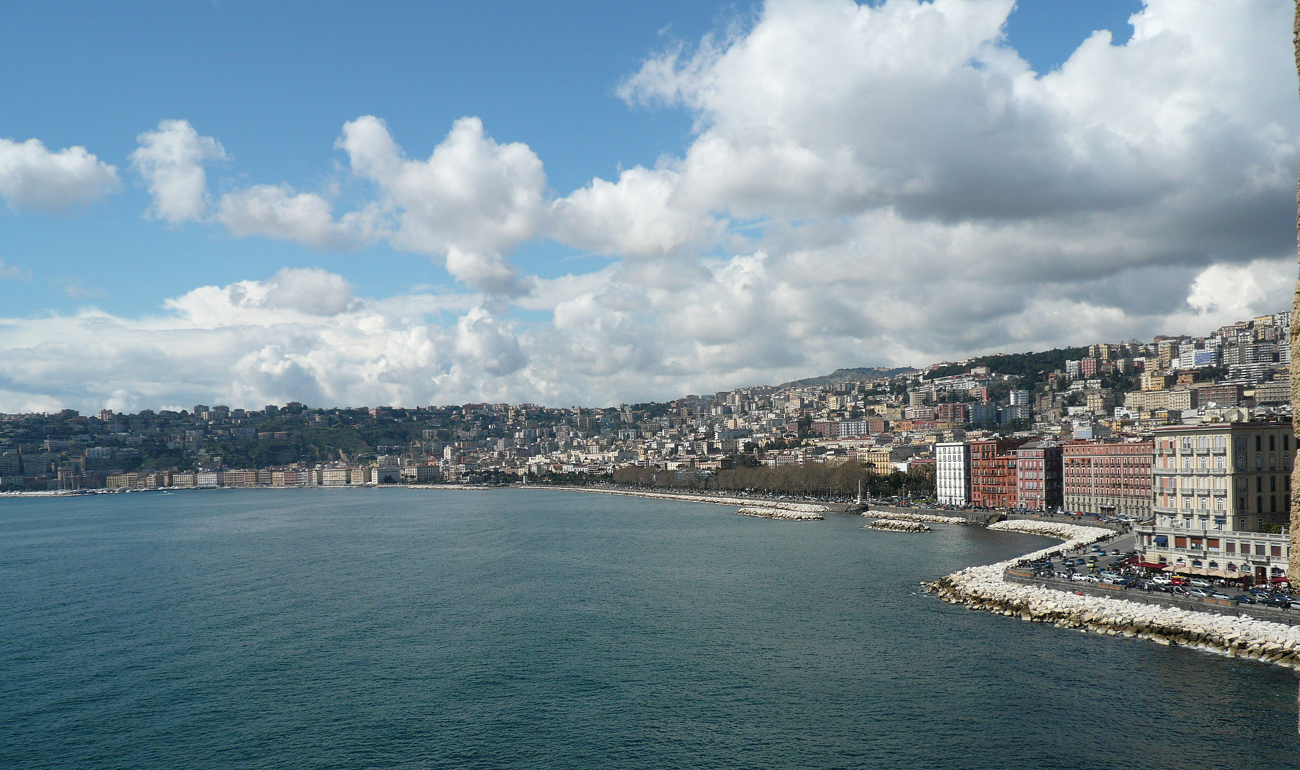 veduta di via Caracciolo (Napoli) da Castel dell'Ovo. Autore foto: Roberto De Martino